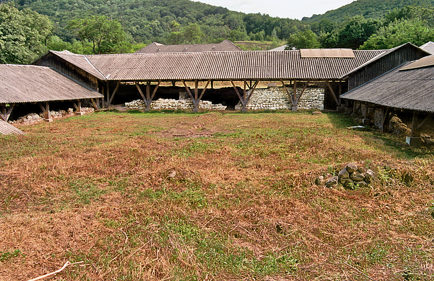 Kastell Visegrád–Gizellamajor (Ungarn): Innenhof (Zustand 2012).